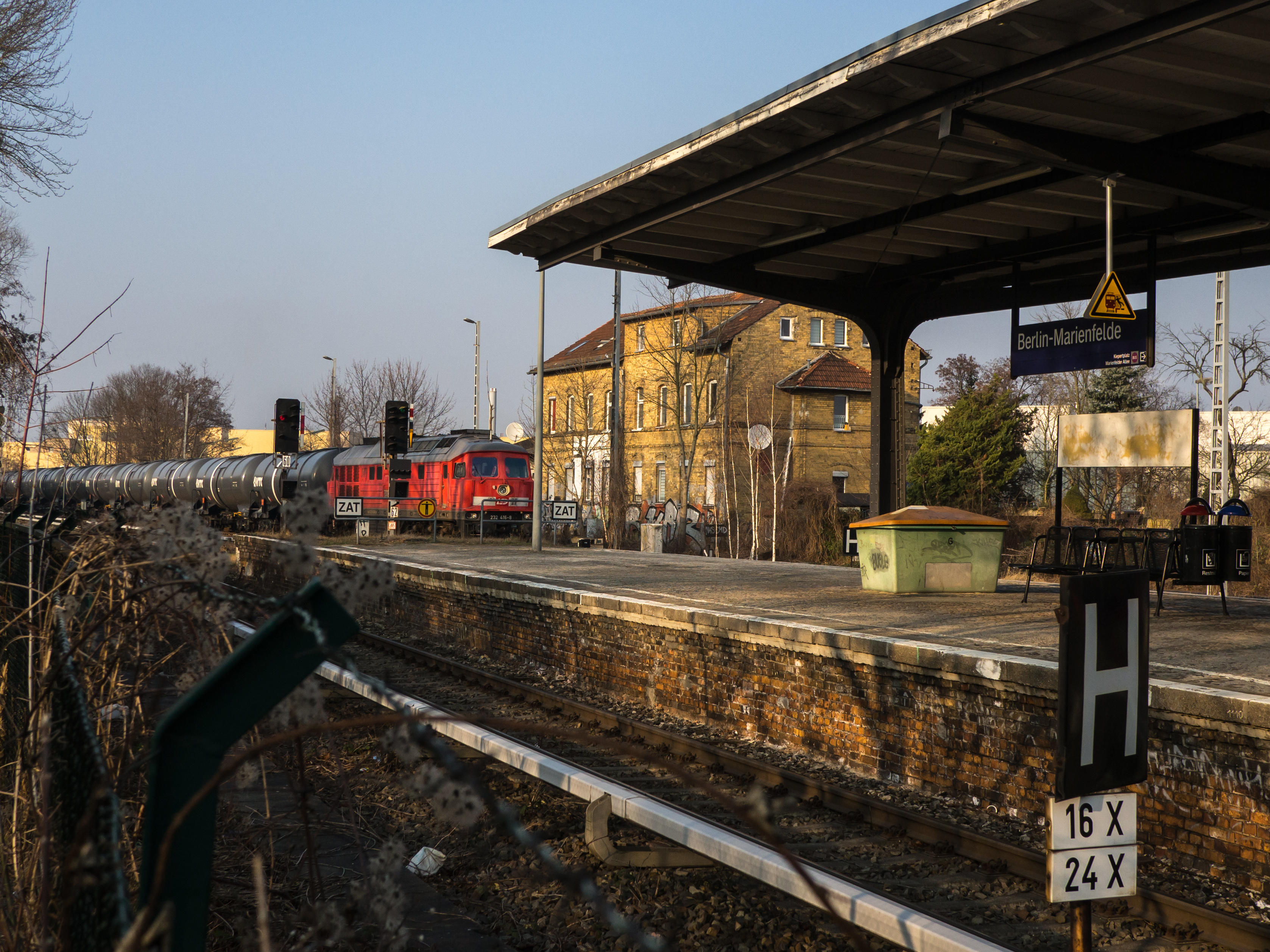 Ein Tankzug, gezogen von 232 416-8 der Leipziger Eisenbahngesellschaft, erreicht den Bahnhof Berlin-Marienfelde. Der Zug kommt aus dem nahegelegenen Oiltanking-Tanklager, wird hier Kopf machen und dann auf die S-Bahnstrecke Richtung Abzweig Mariendorf nördlich von hier fahren.